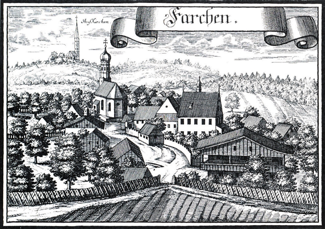 Ehemaliger Hofmarkssitz Farchach, Kupferstich von Michael Wening.